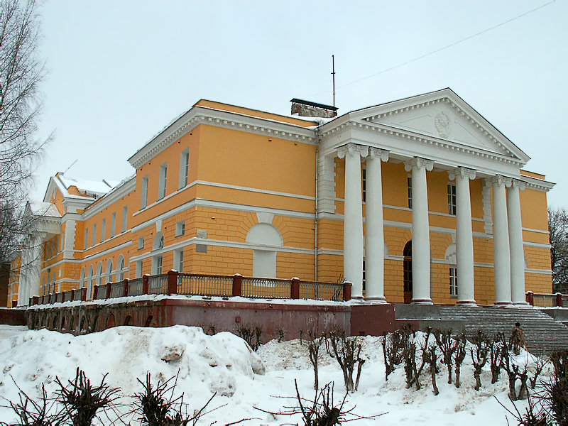 Коноваловский дворец (Народный дом, рабочий клуб фабрики им. Ногина, Городской культурный центр, Дворец культуры), 1915-1925, арх. П. Малиновский, В. Веснин, Н. Лазарев